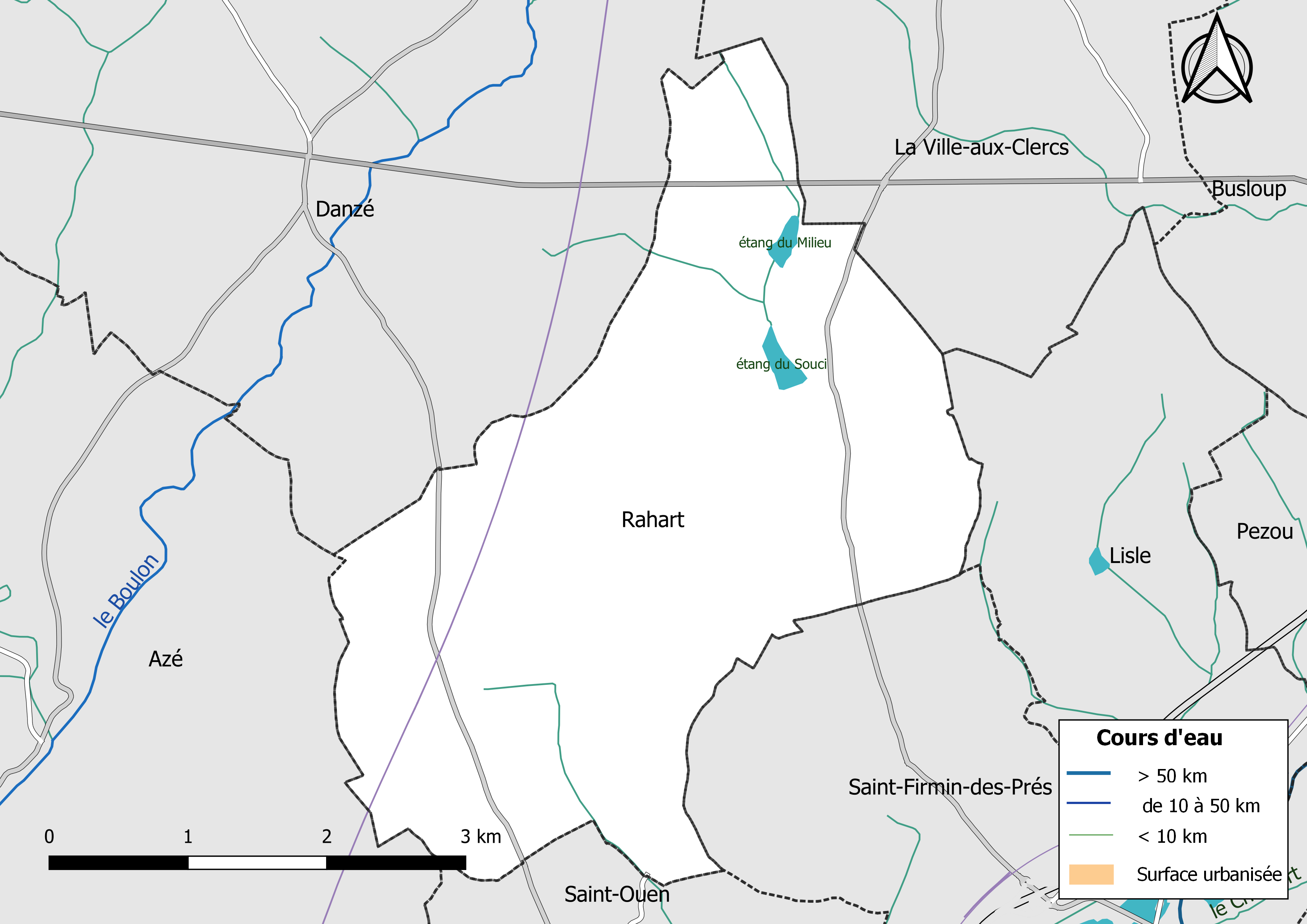 Carte du réseau hydrographique de la commune de Rahart (Loir-et-Cher, France).